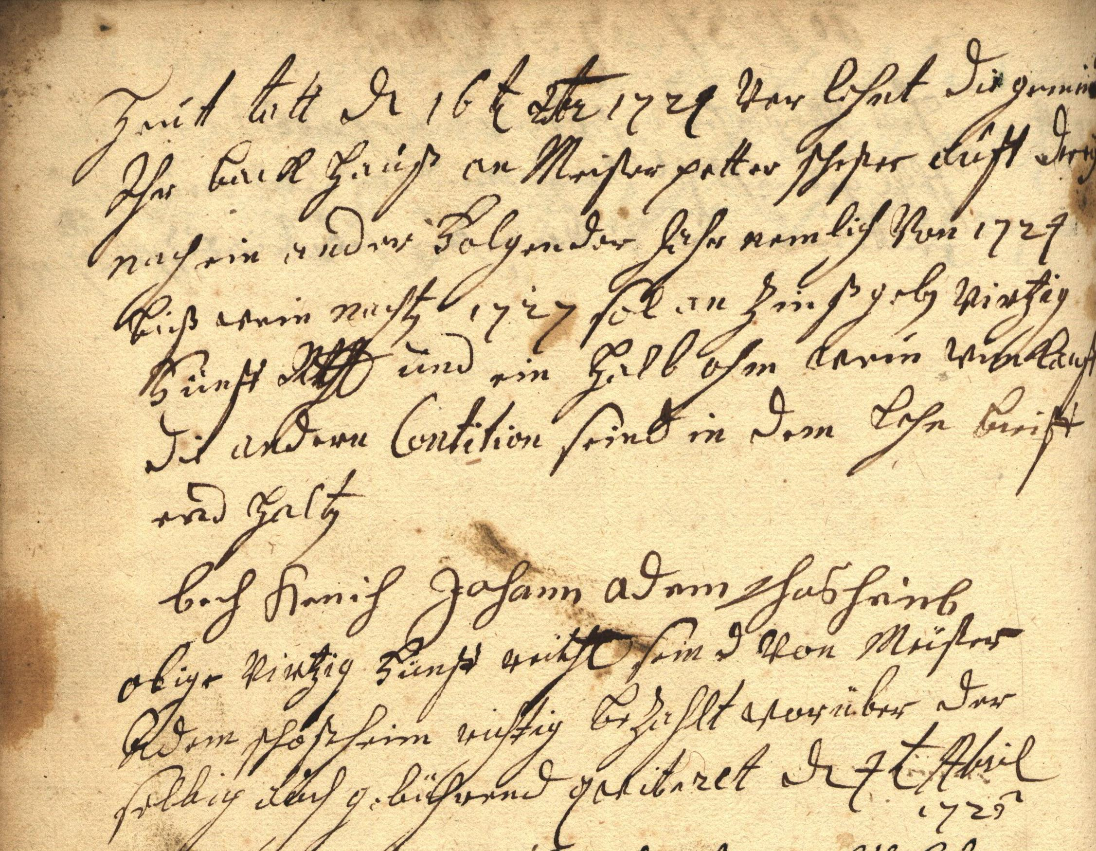 Die Verpachtung des Gemeindebackhauses an einen Berufsbäcker.